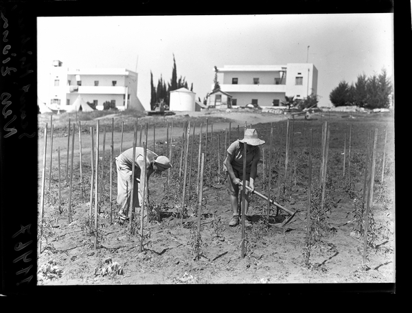 גבעת מיכאל, נס ציונה, עבודה חקלאית בשדה